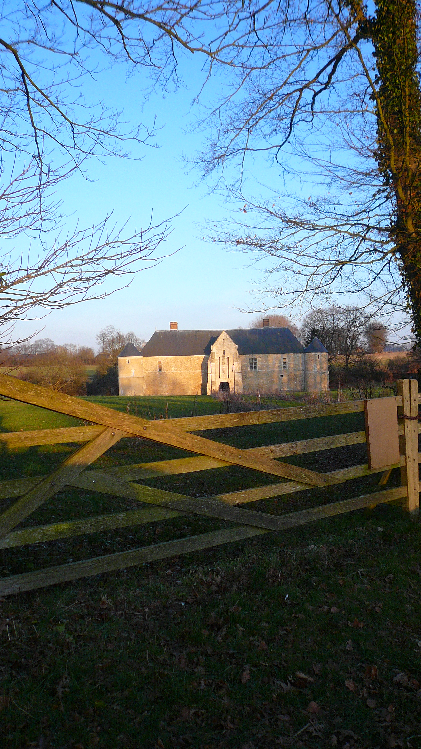 Manoir du Catel